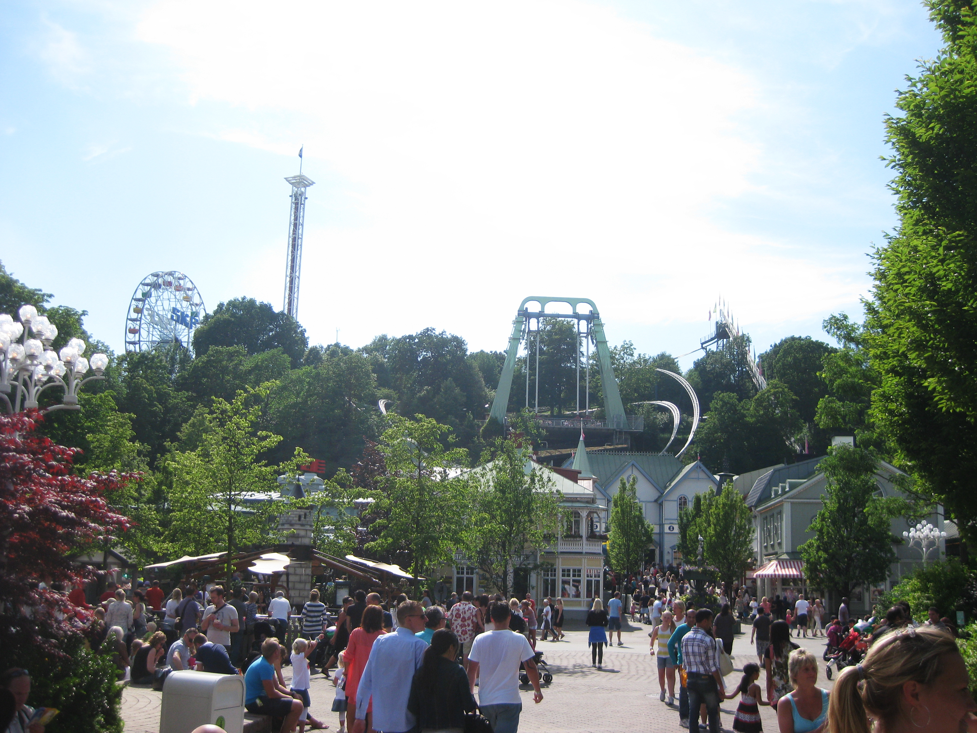 Liseberg i juli 2012. På bilden syns (från vänster): Pariserhjulet, Höjdskräcken, Uppswinget. Till höger om Uppswinget syns Lisebergbanans långa uppförsbacke.